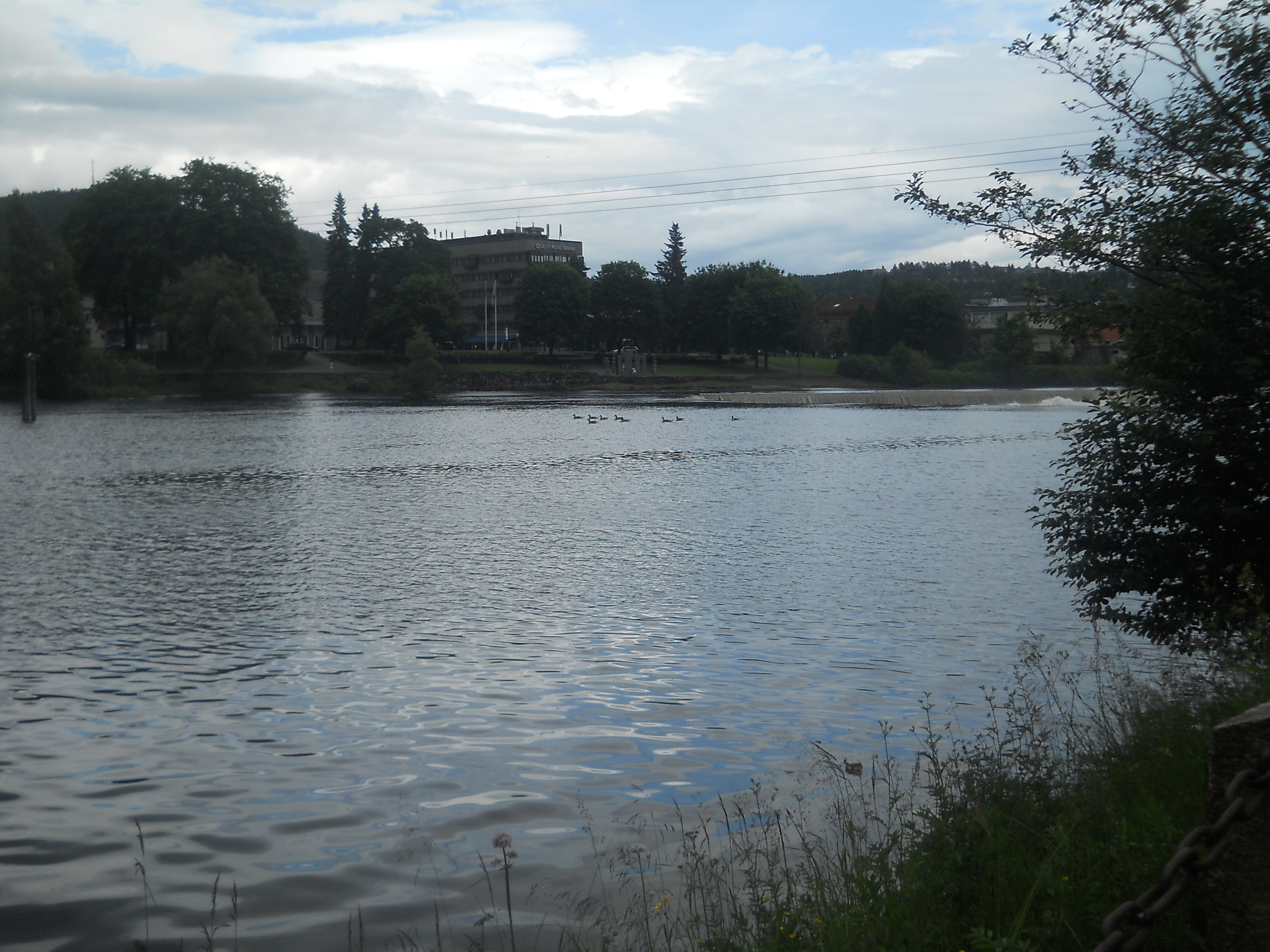 Српски (ћирилица): Река у Норвешкој